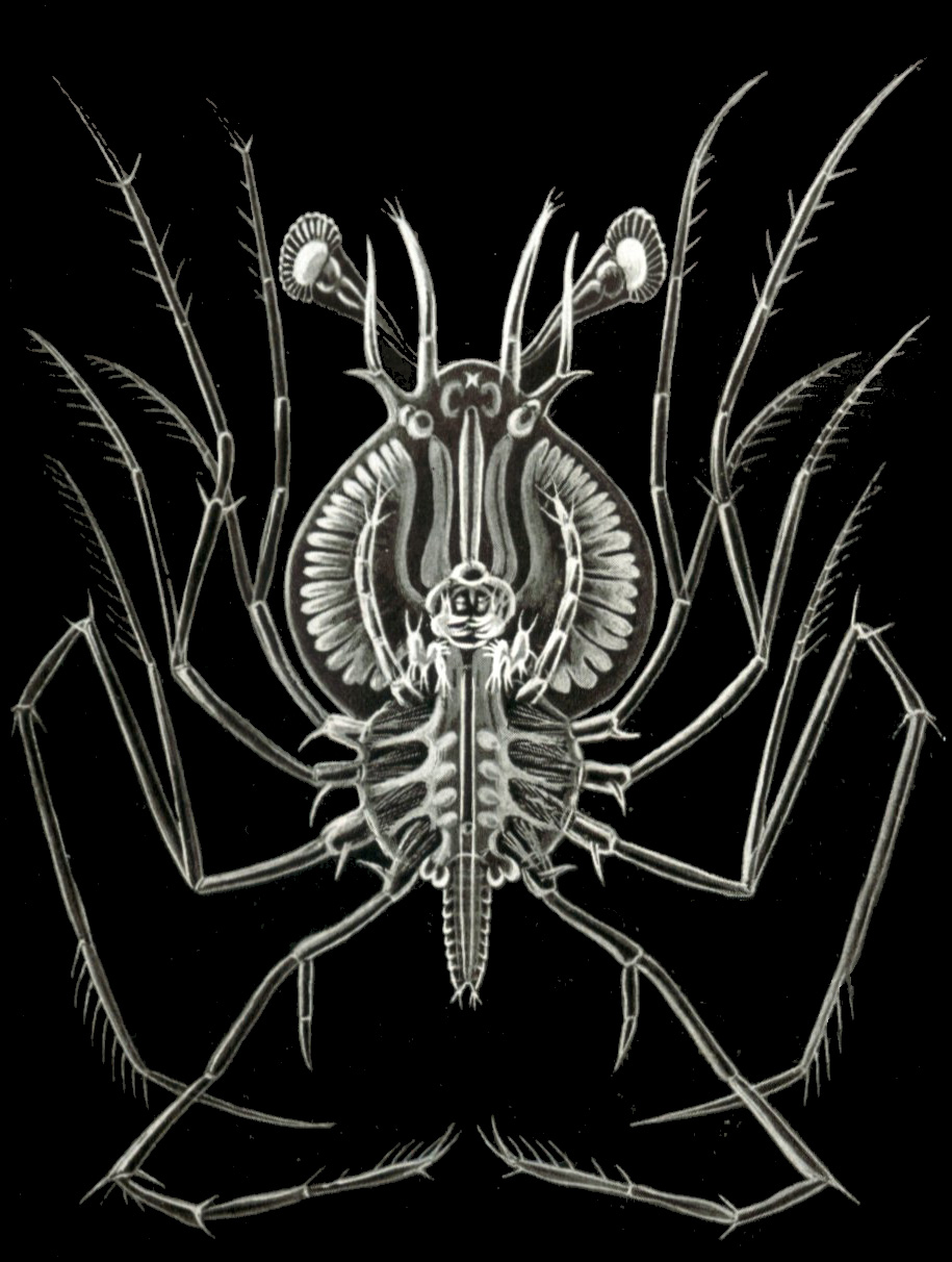 Phyllosoma palinuri (Milne-Edwards) = Palinuridae (Palinurus elephas?), phyllosoma larva